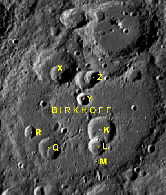 Cráter lunar Birkhoff. Cráteres satélite. (Imagen LRO)